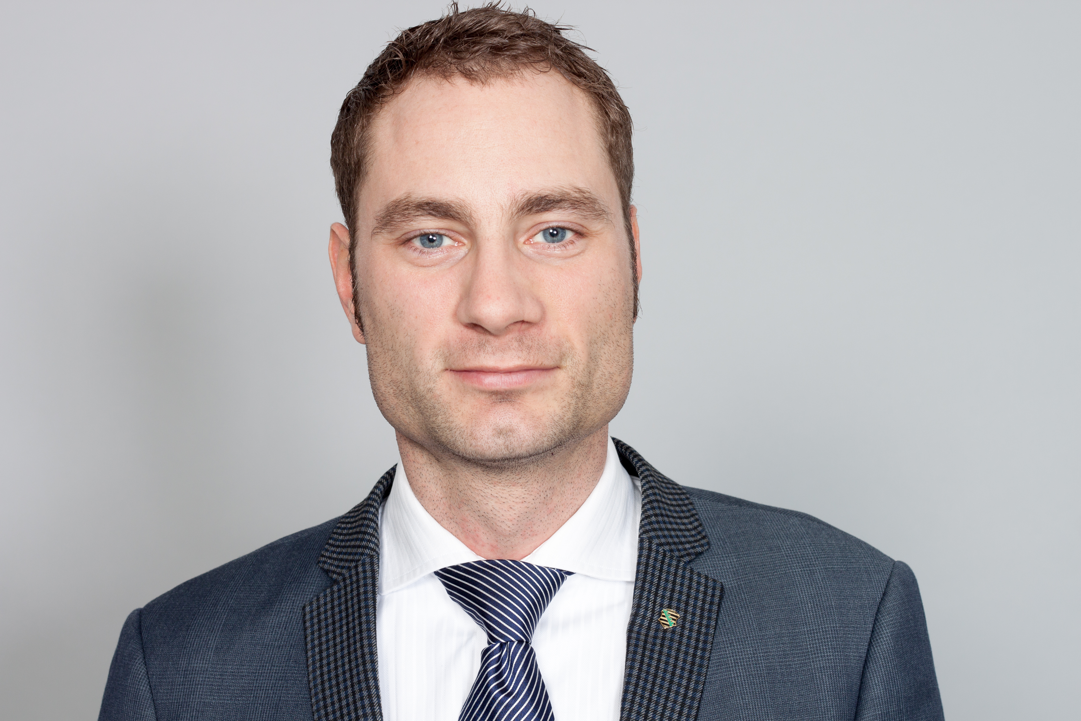 Abgeordneter des Sächsischen Landtages Patrick Schreiber